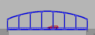 Vierendeel Träger